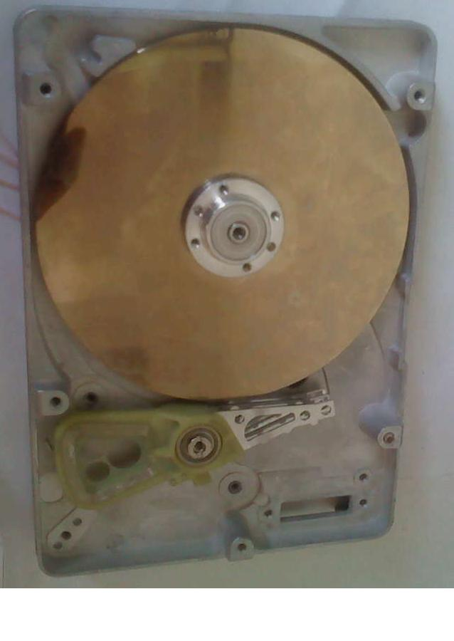 Татарча/tatarça: Каты диск